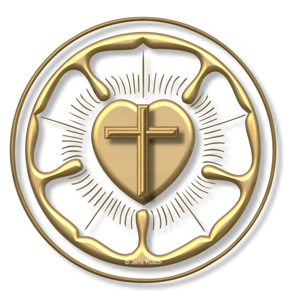 Luther-Rose. Vectorgrafik von Jens Rusch